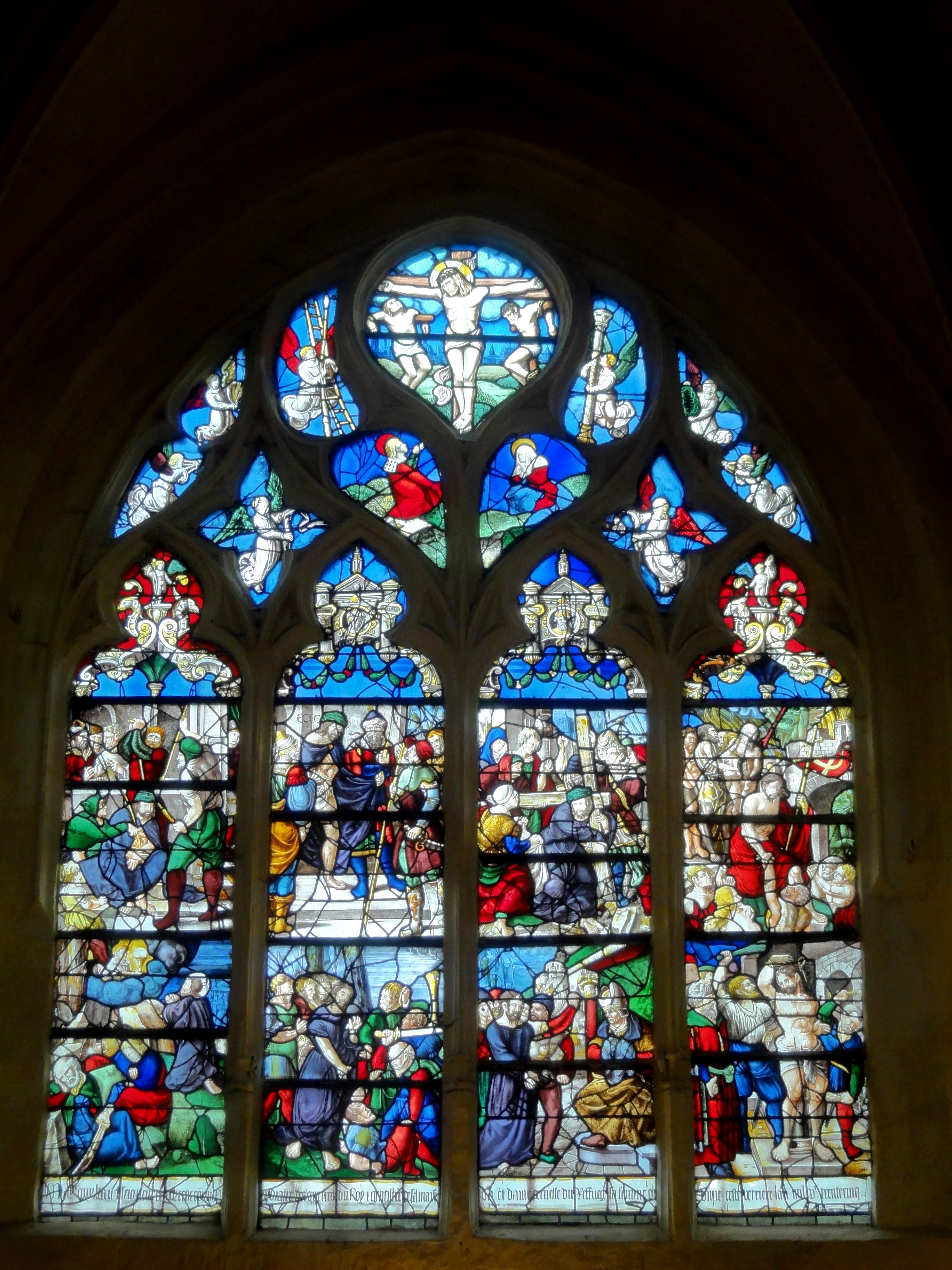 Chœur, vitrail de la Passion du Christ, école d'Engrand Leprince, 1535 (vitrail n° 0).